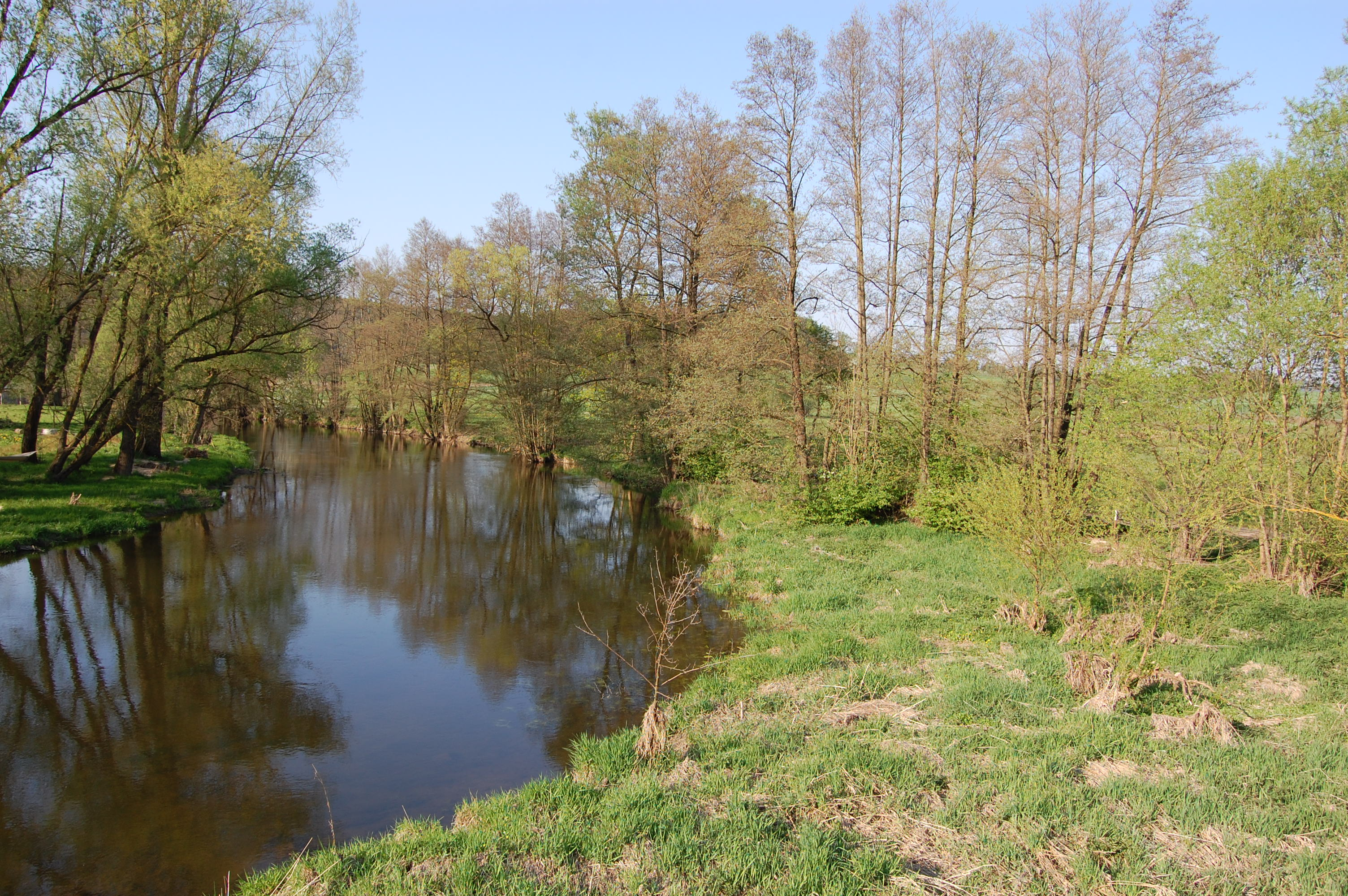 Der Fluss Schwarzach beim Ort Schwarzach (Schwarzach bei Nabburg). (2011)